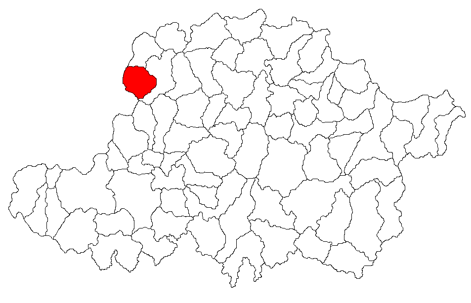 Categorie:Hărţi ale judeţului Arad